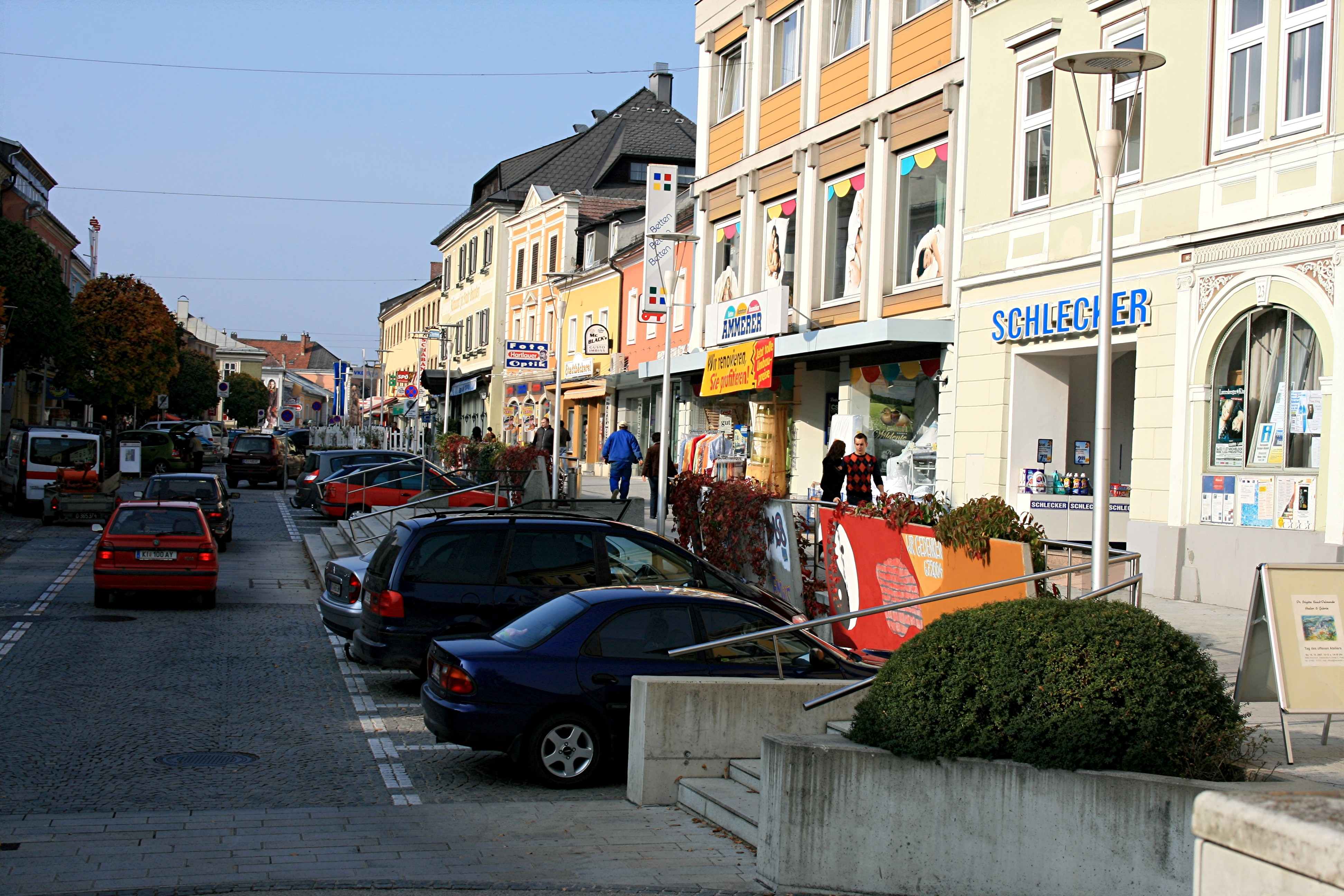 Der Hauptplatz von Kirchdorf an der Krems (Oberösterreich)